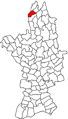 Categorie:Hărţi ale judeţului Olt